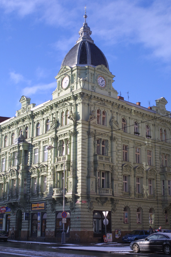 Nárožní dům s věžičkou a hodinami na Klatovské tř. 20 v Plzni. Projekt a stavba: František Kotek (1894). Foto: Eva Haunerová, 2005